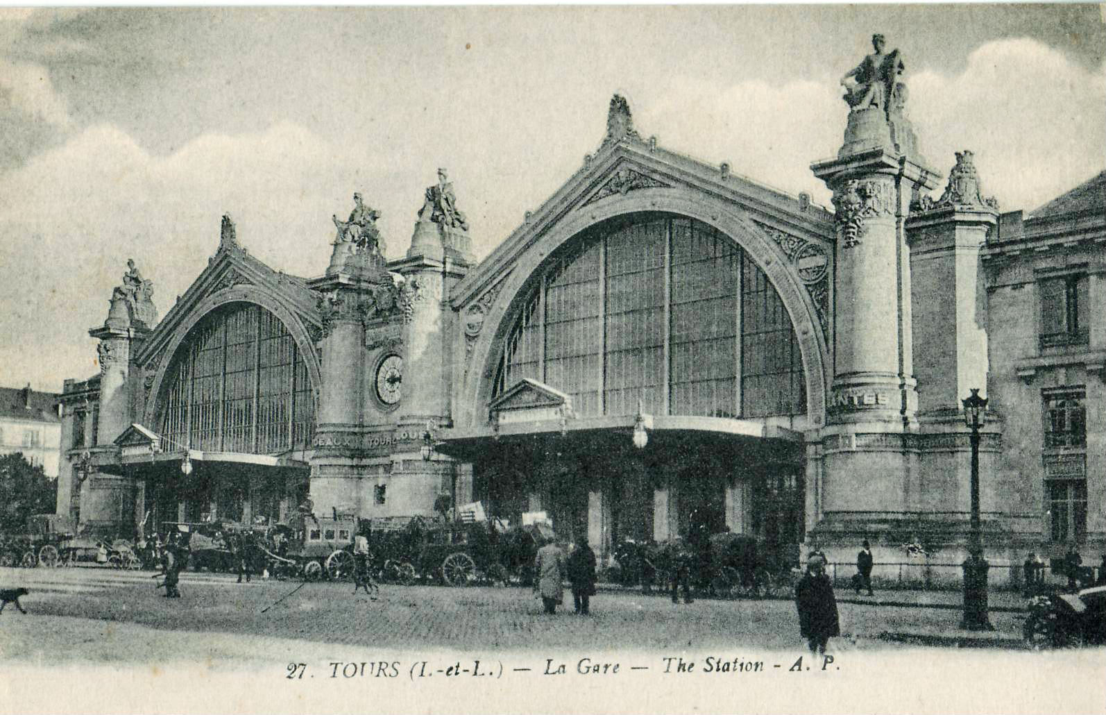 Carte postale ancienne éditée par AP n°27 : TOURS - La Gare